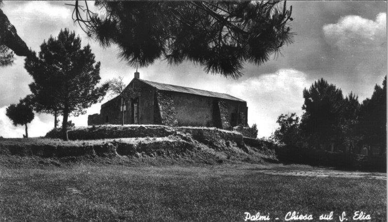 Palmi. La vecchia chiesa di Sant'Elia ricostruita dopo i terremoti del 1894 e del 1908 e distrutta durante la Seconda Guerra Mondiale.